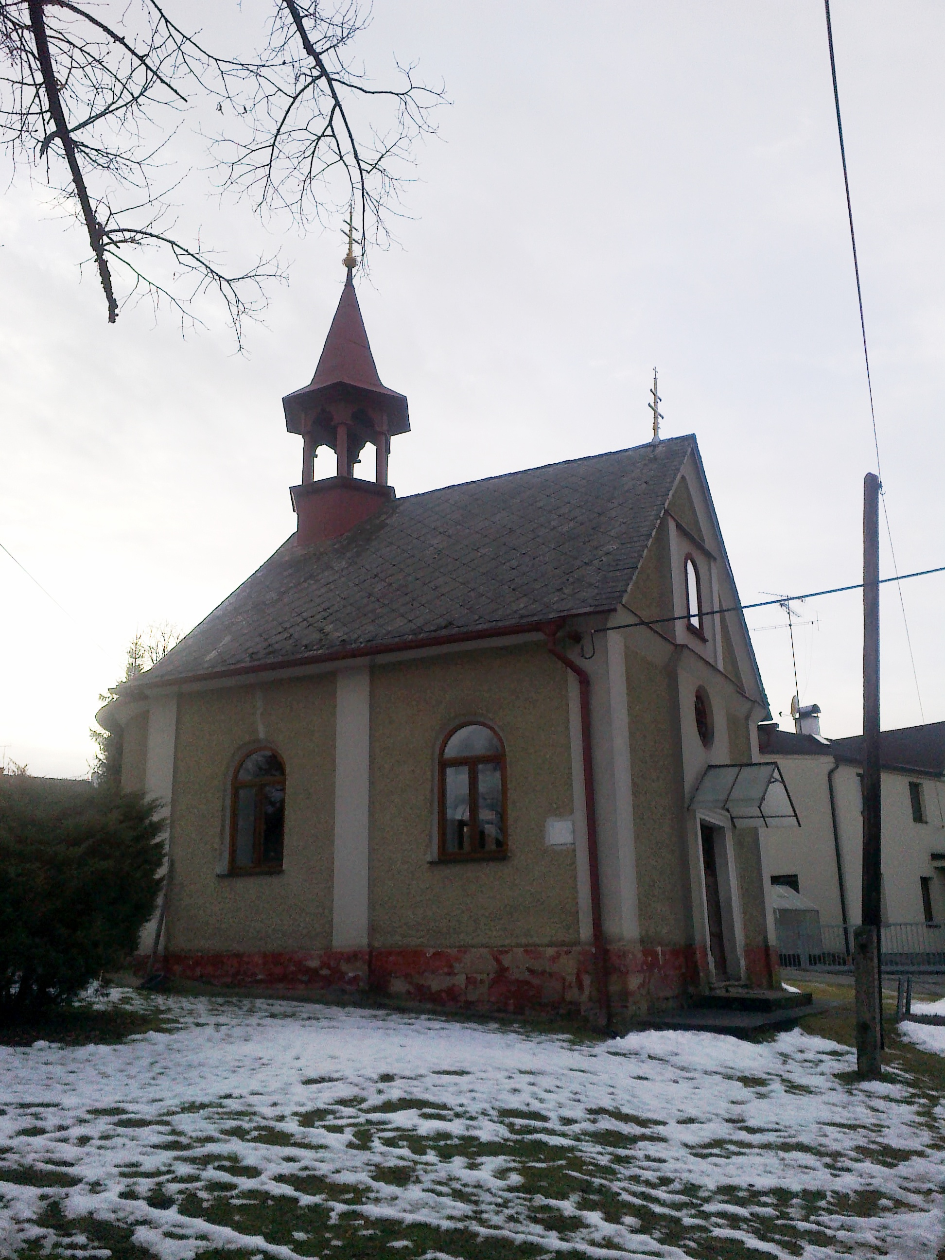 Kaple sv. Cyrila a Metoděje Horní Radechová02